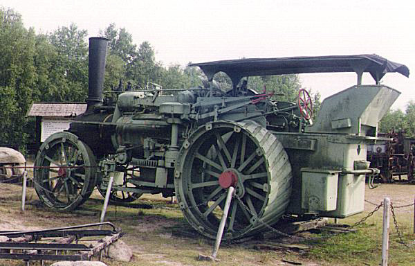 Selbstfahrende Lokomobile („Pfluglokomotive“) im Moormuseum Groß Hesepe.